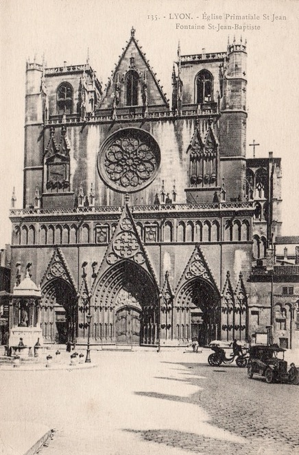 Église primatiale Saint-Jean à Lyon, carte postale ancienne